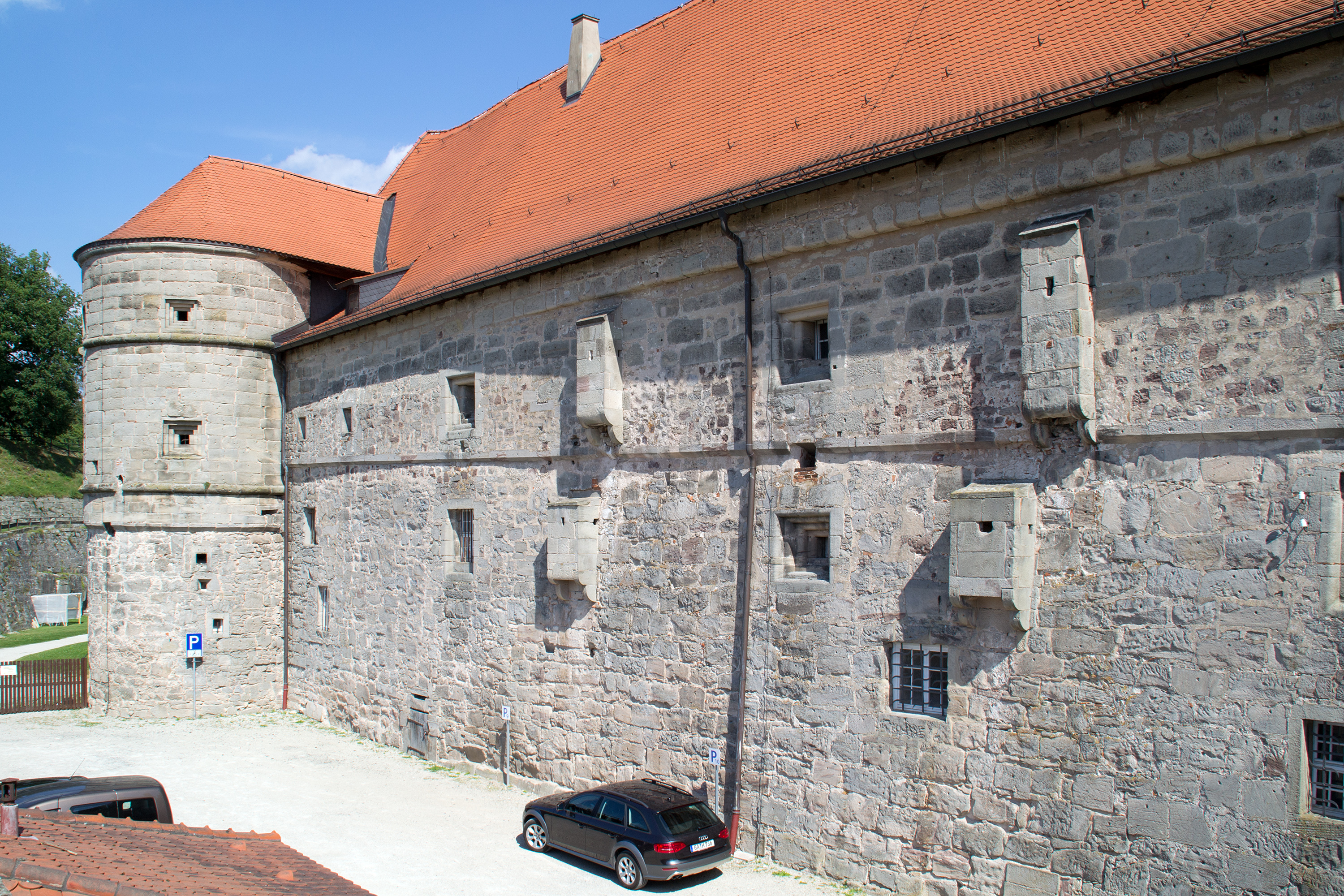 Luntenturm und Altes Zeughaus der Festung Rosenberg in Kronach.